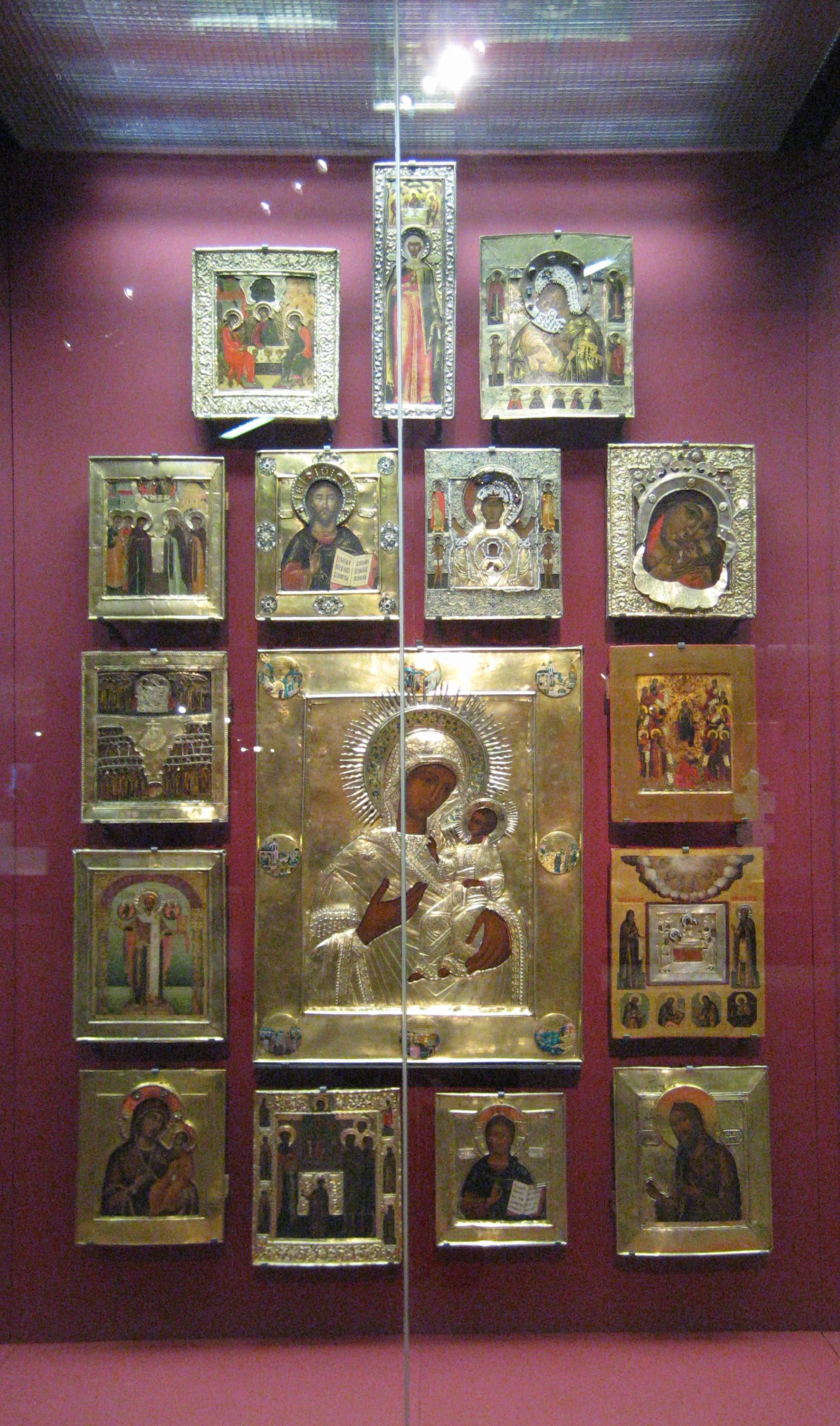 НАДГРОБНЫЙ ИКОНОСТАС ЦАРЕВНЫ СОФЬИ В СМОЛЕНСКОМ СОБОРЕ НОВОДЕВИЧЬЕГО МОНАСТЫРЯ